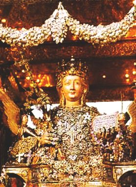 Giovanni di Bartolo, Il busto argenteo di Sant'Agata conservato nel Duomo di Catania.